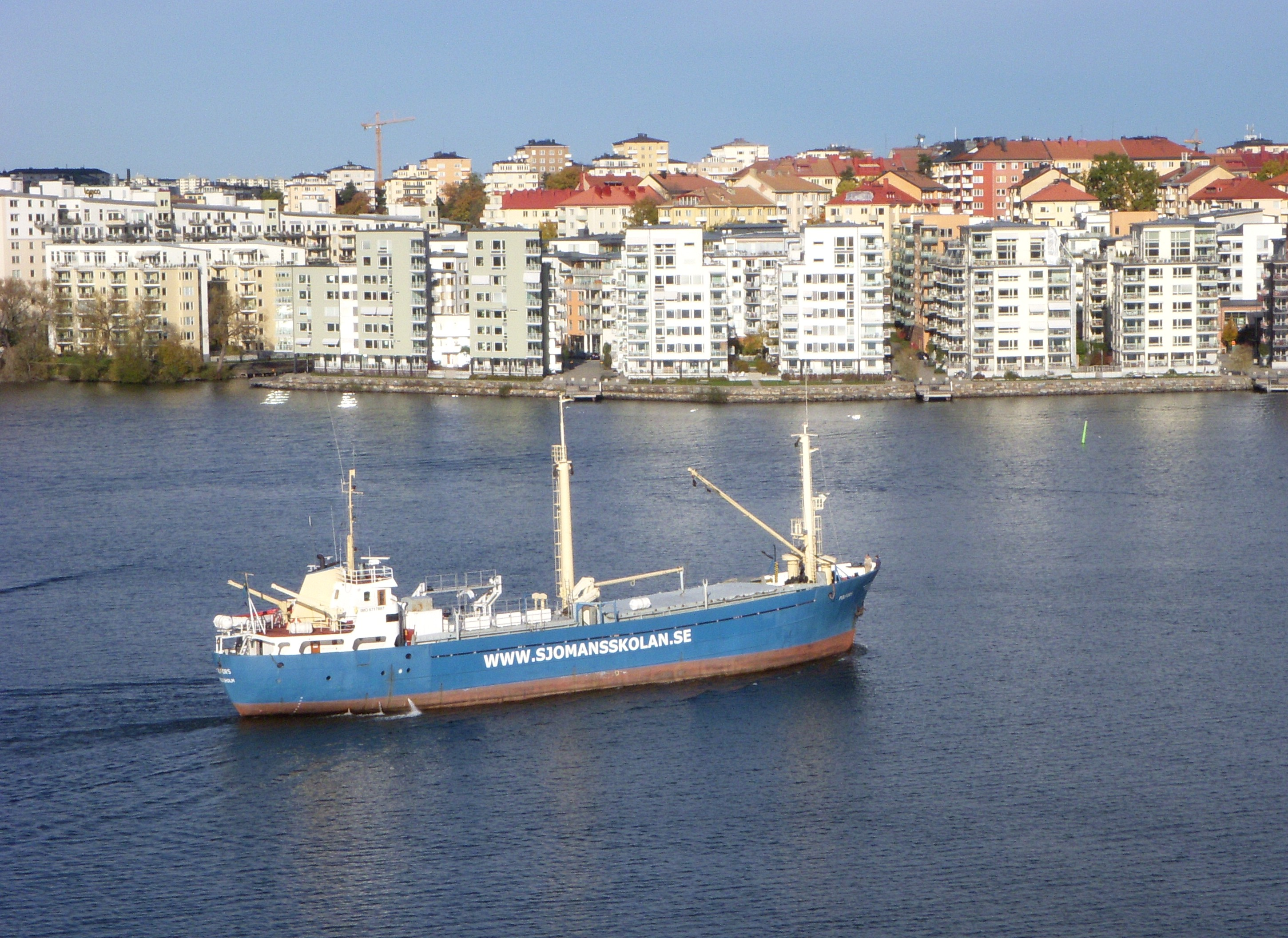 Sjömasskolans fartyg "Polfors" på Mälaren vid Lilla Essingen